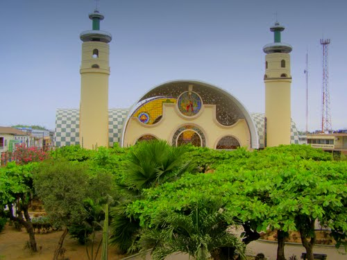 Parque central de Calceta, al frente podemos ver la Iglesia del Cantón